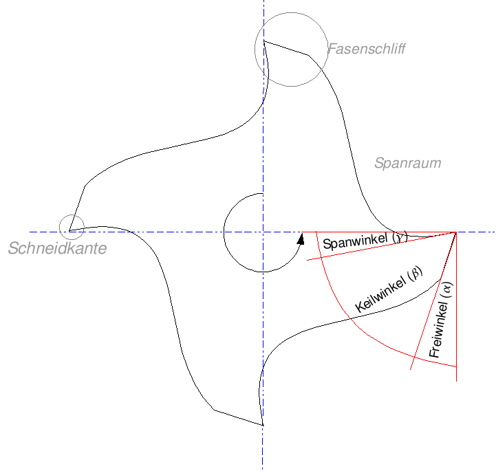 Schneidegeometrie eines rotierenden Fräswerkzeugs